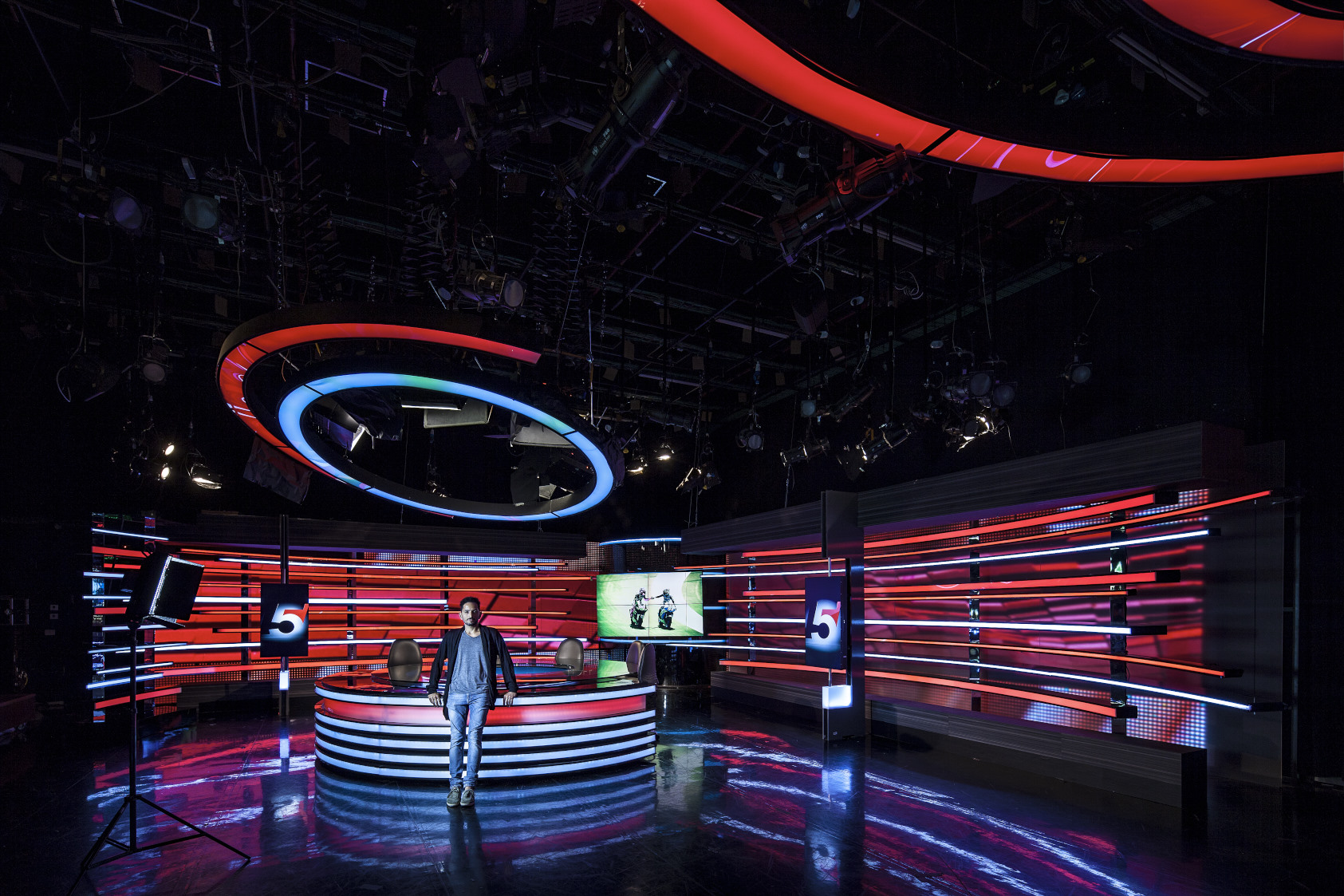 סט מעוצב לאולפן ערוץ הספורט הישראלי